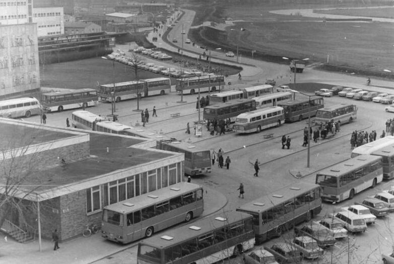 Guben, Chemiefaserwerk, Schichtwechsel ADN-ZB Link 1.9.80 Bez. Cottbus: Chemiefaserwerk Guben- Während des Schichtwechsels bestimmen ankommende und abfahrende Busse das Bild vor dem Eingang des Chemiefaserwerkes Herbert Warnke in Guben. Innerhalb der Stadt verkehren Linienbusse zum Werk. Werktätige, die außerhalb der Stadt wohnen, benutzen die Busse des Berufsverkehrs und zahlen monatlich 10,-- Mark, unabhängig von der Entfernung. Der Berufsverkehr wird vom Betrieb finanziell gestützt.